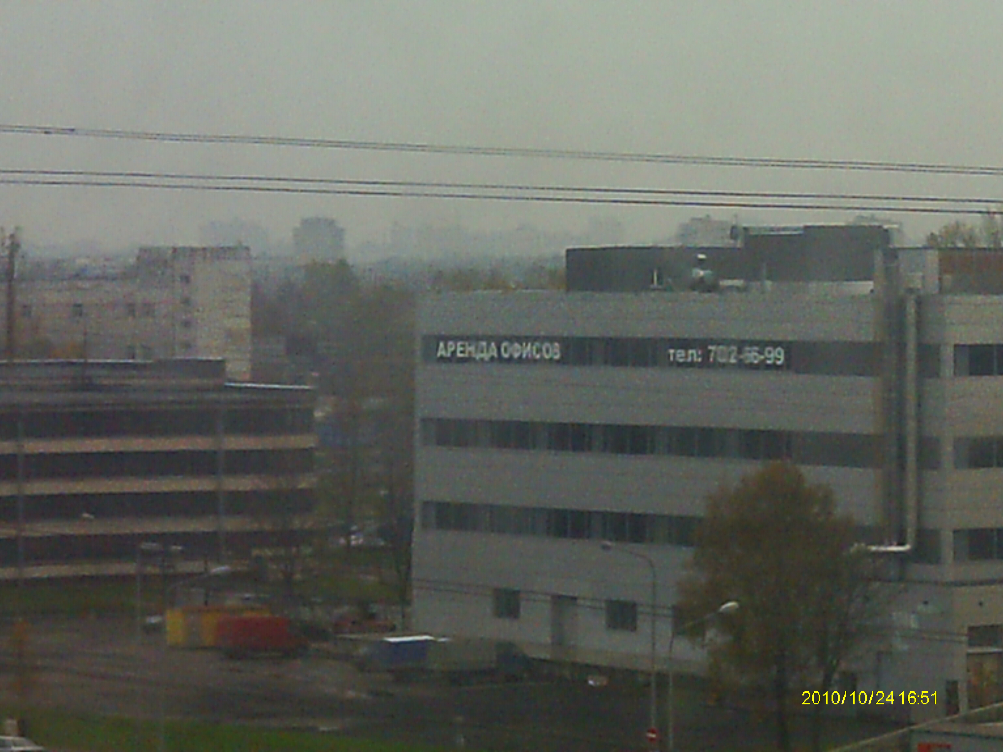 Бывшая кулинария на Ключевой